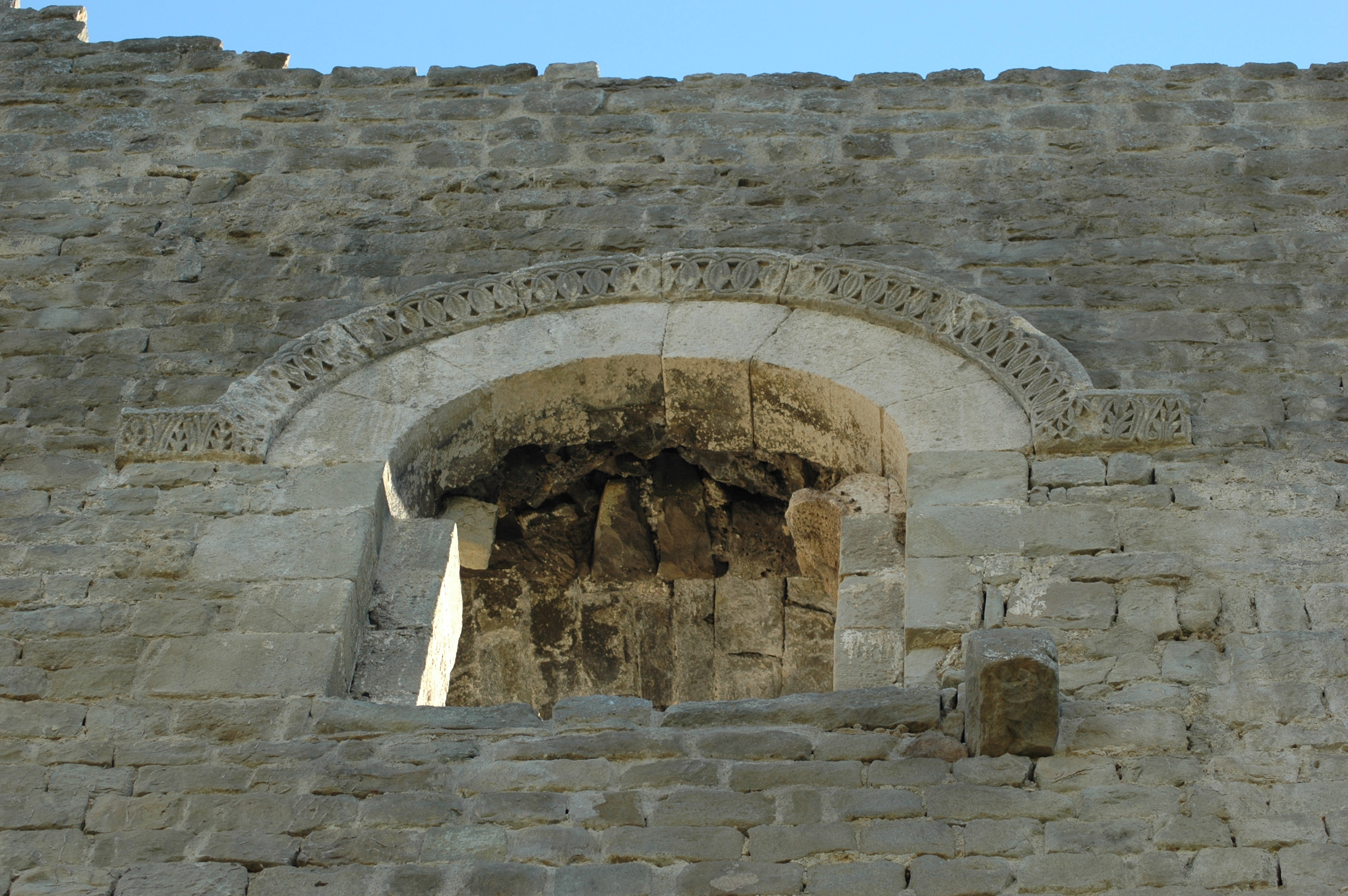 Fenêtre du château des comtes de Poitiers à Bourdeaux